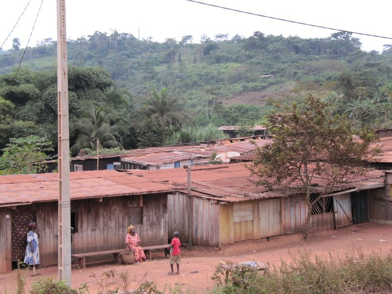 Vue de Lastourville aux environs de la gare